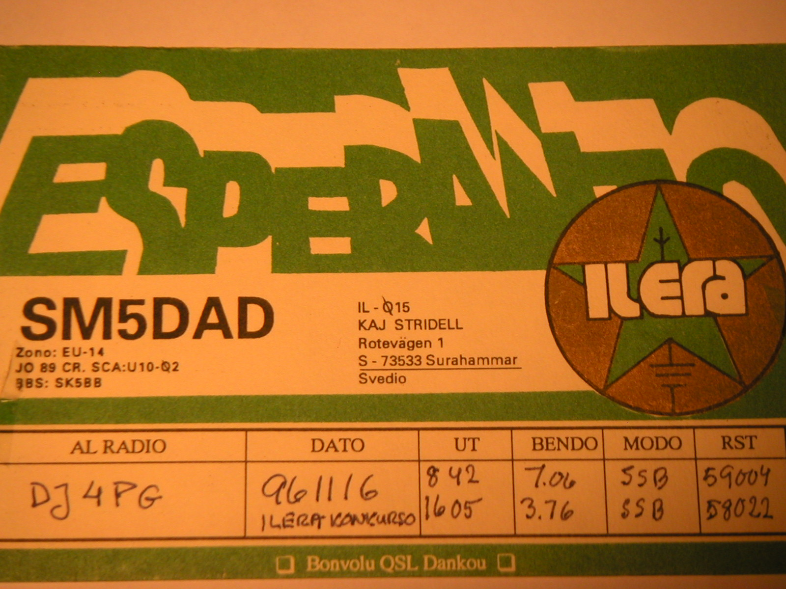 konfirmkarto (QSL) de radioamatoro SM5DAD